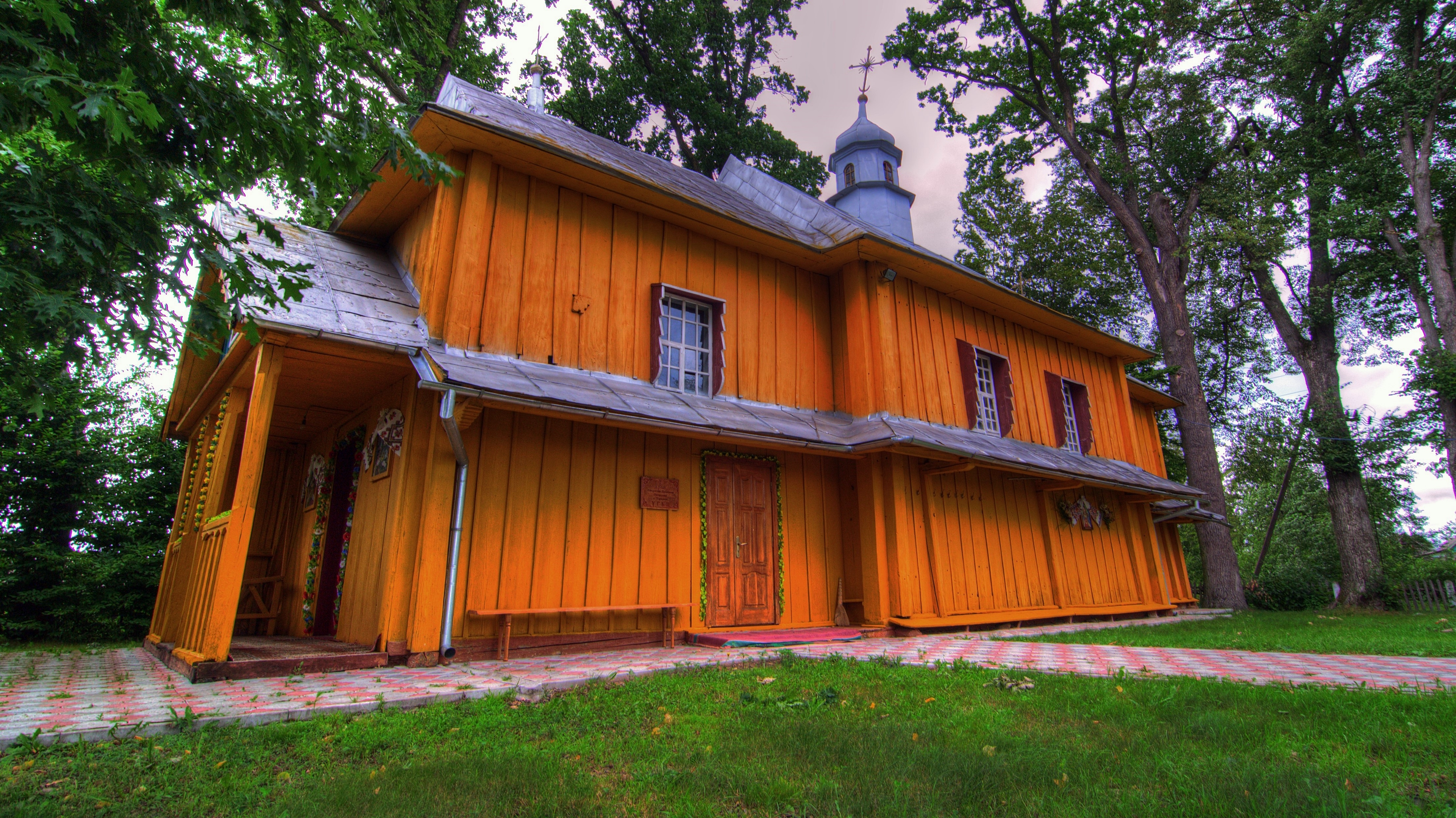 Дерев'янна церква